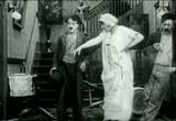 Escena de la película "Work" de Charles Chaplin